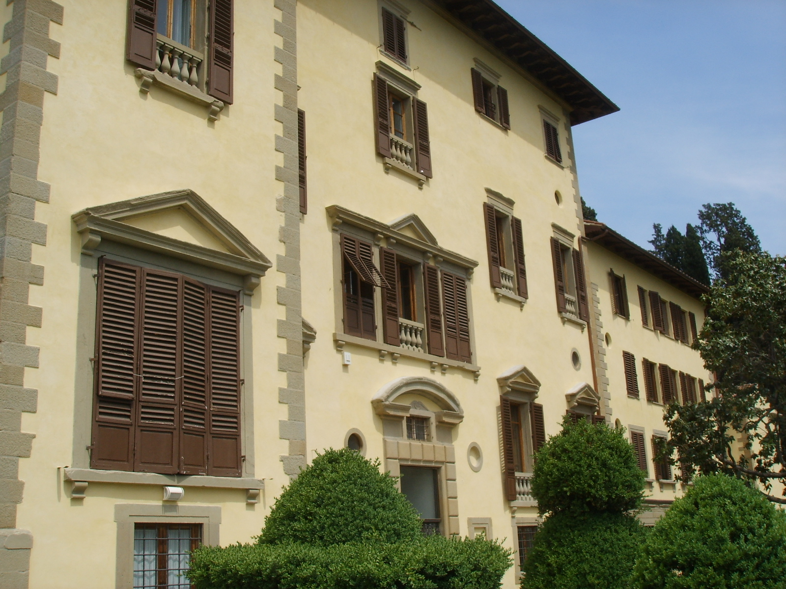 Villa la torraccia